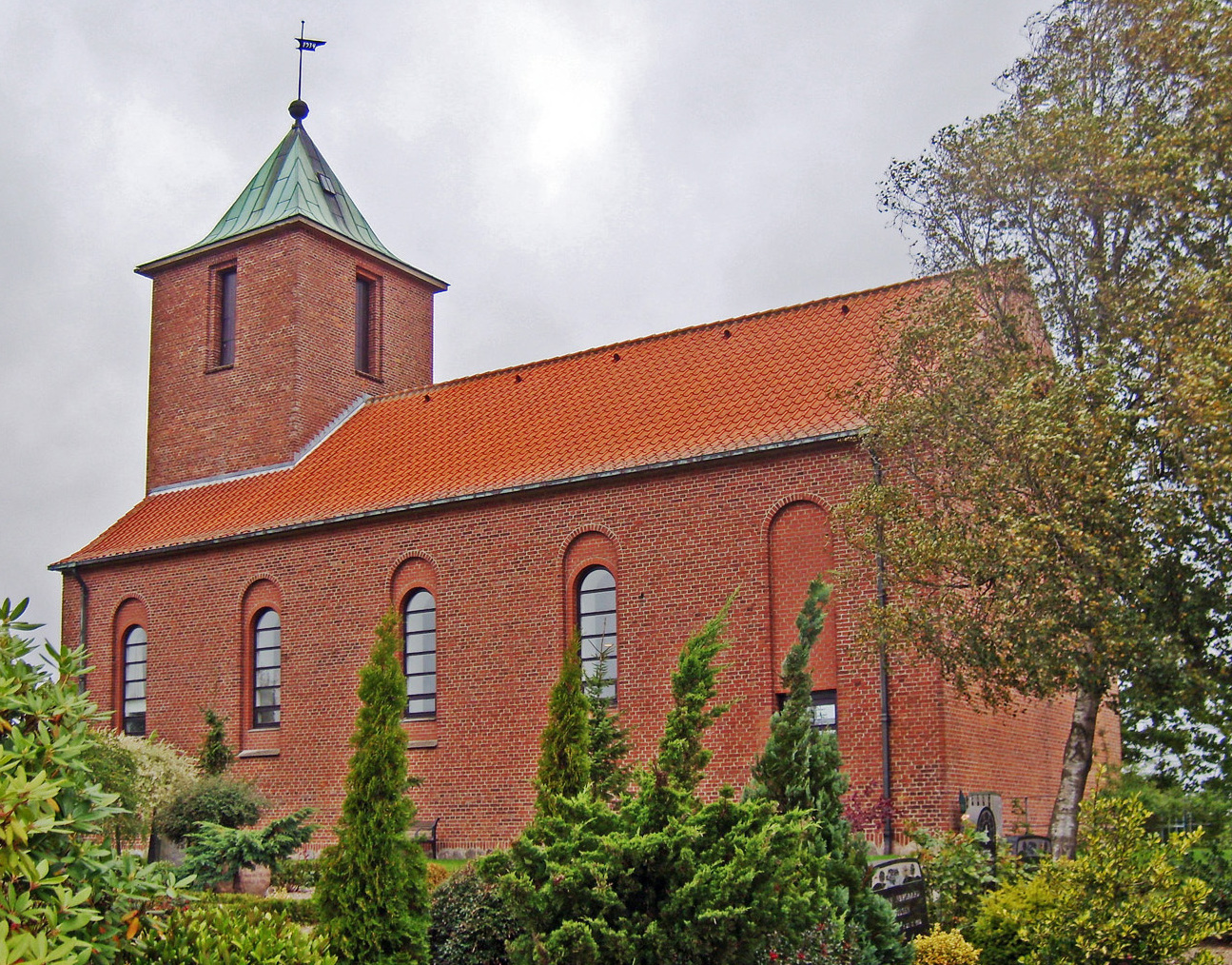 Arden kirke (Mariagerfjord) fra sydøst